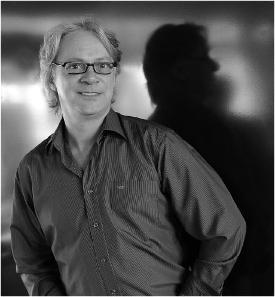 Portrait von Dirk-Alexander Grams